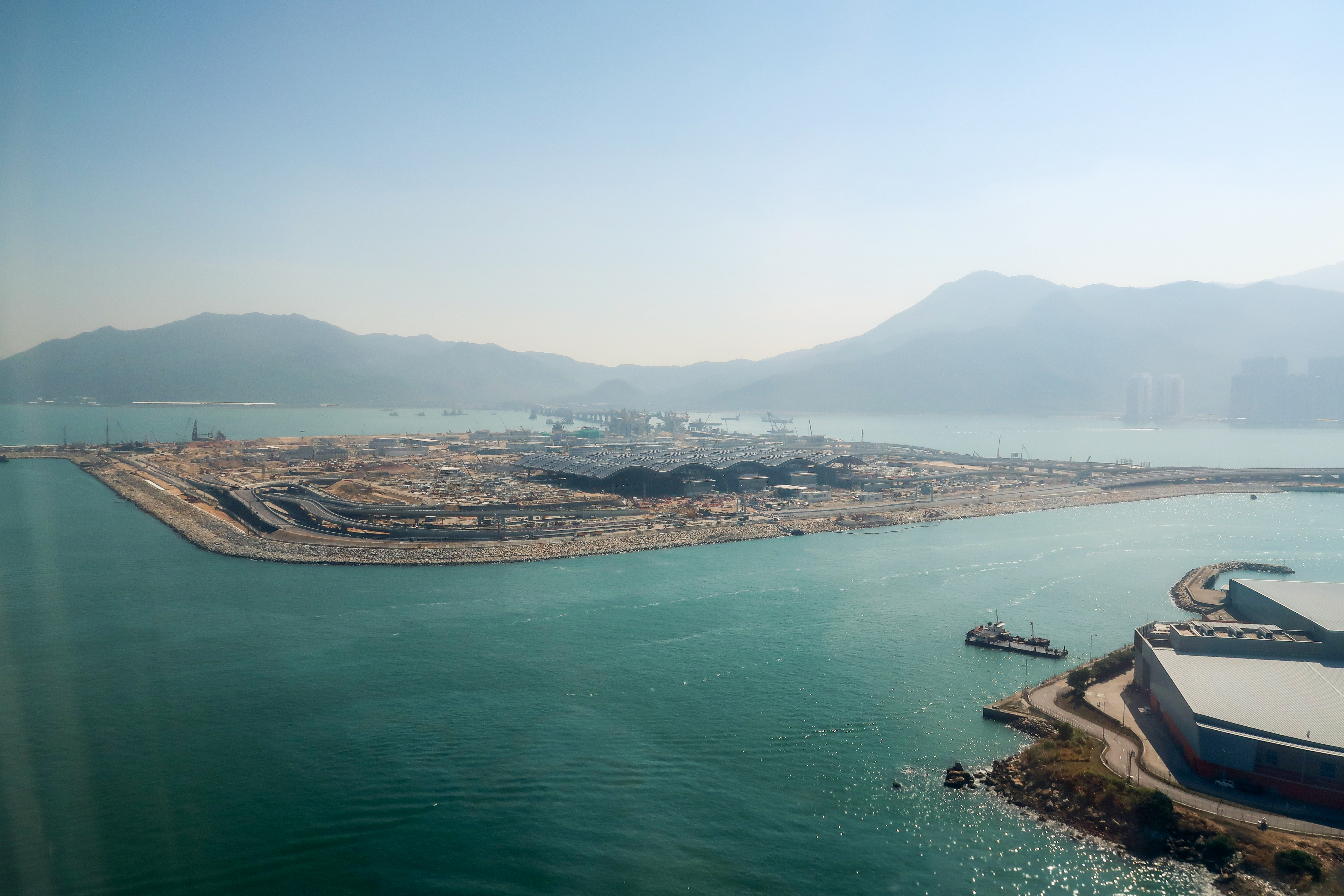 HKBCF Site view